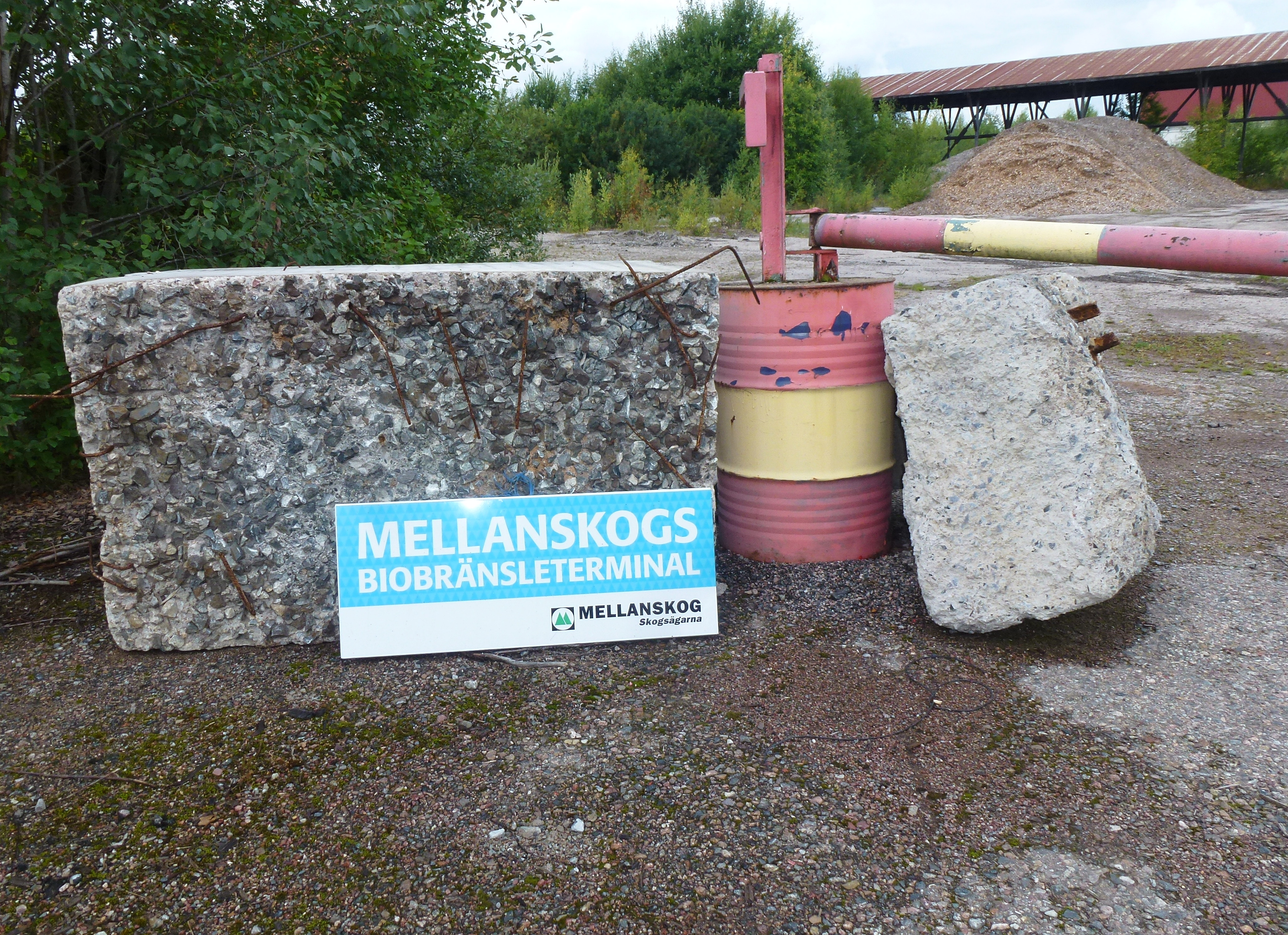 Grangärde ångsåg "Mellanskogs biobränsleterminal"